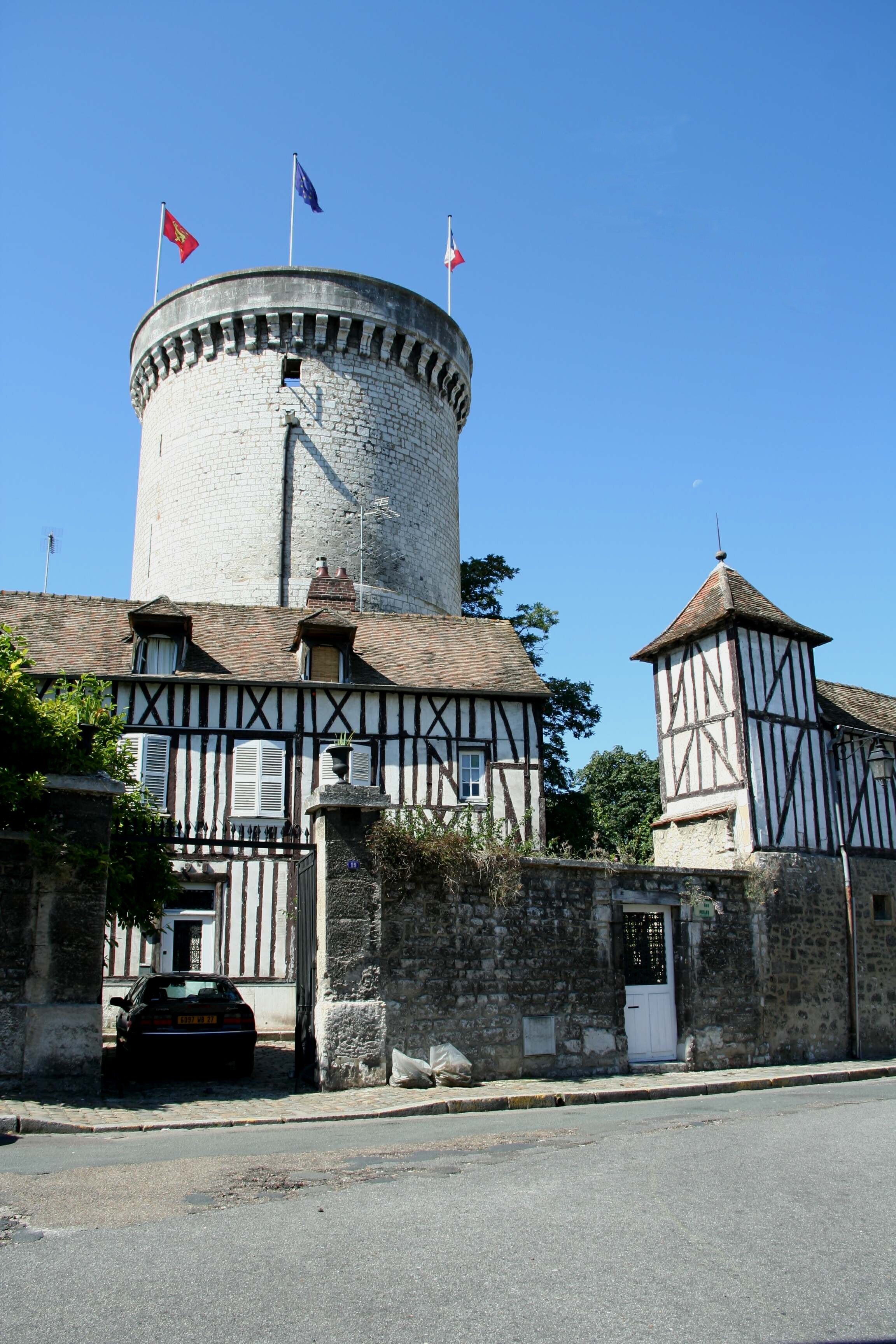 Tour des Archives à Vernon, Eure (France)